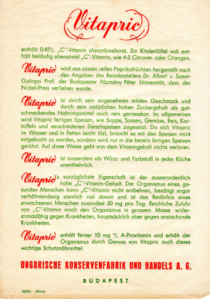 Vitapric ajánló németül